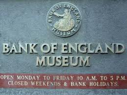 Музеј на Банка на Англија